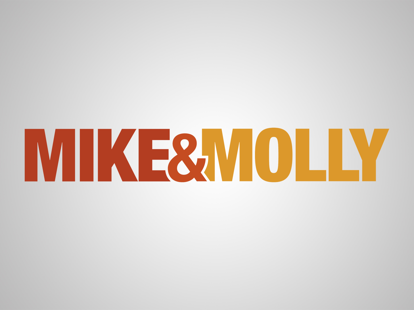 Diese Grafik zeigt das Logo der TV Serie Mike and Molly